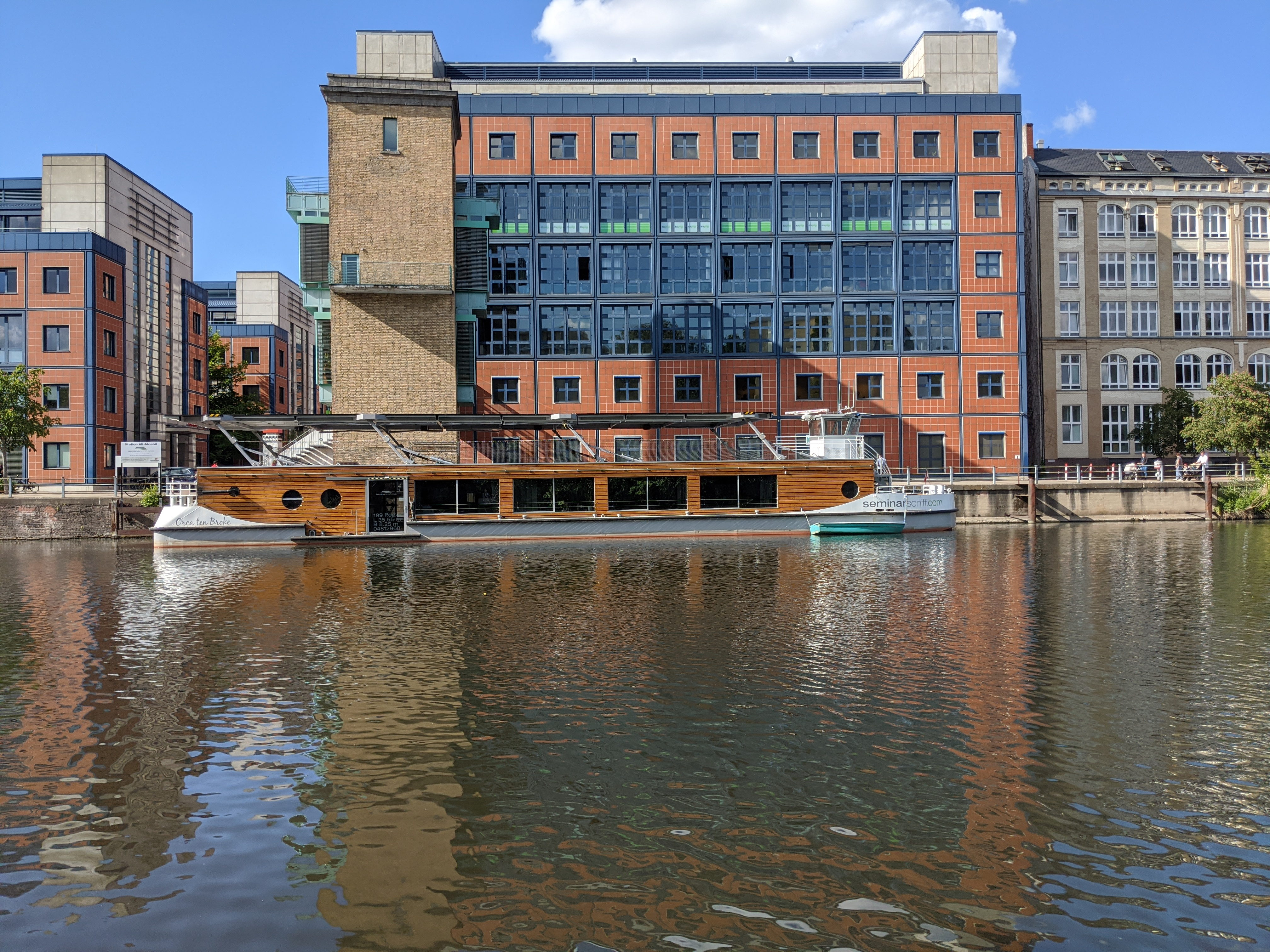 Solarschiff Orca ten Broke am Liegeplatz Focus Teleport Berlin in Berlin Alt-Moabit Das Schiff verfügt über eine Photovoltaikanlage, die eine Leistung von bis zu 32 Kilowatt hat. Bei günstiger Wetterlage kann sie den gesamten Energiebedarf decken. Die Batterieanlage hat eine Kapazität von 250 Kilowattstunden.